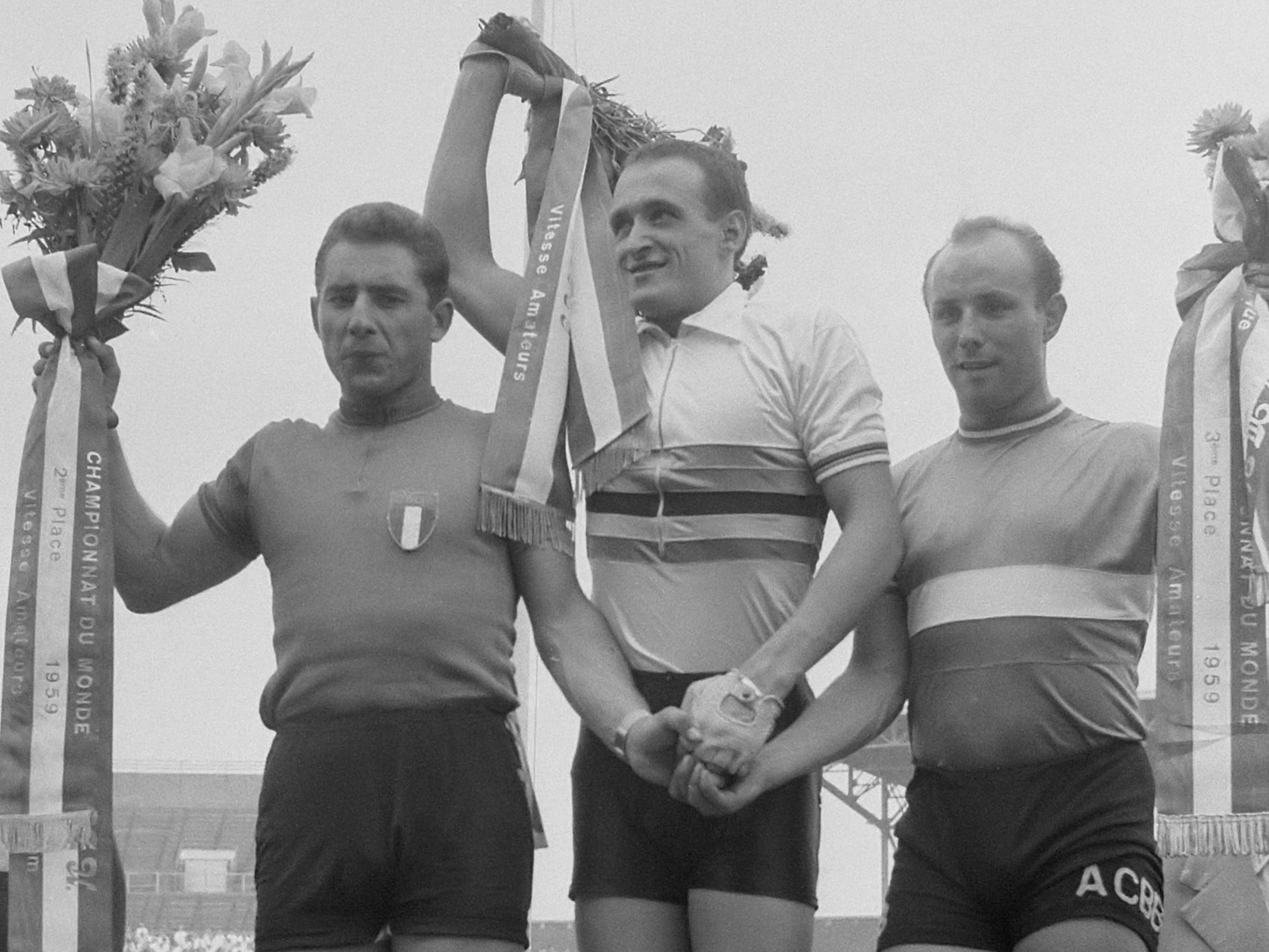 Wereldkampioenschap wielrennen op de baan in het Olympisch stadion te Amsterdam, huldiging winnaar amateur sprint Gasparella 9 augustus 1959